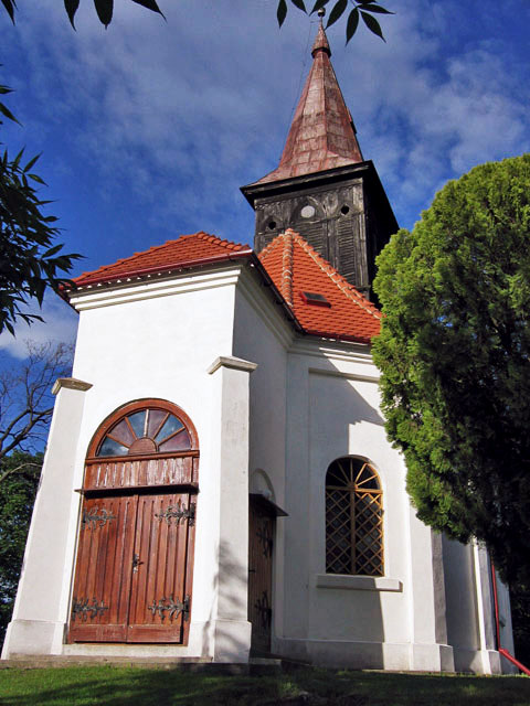 Zatoń Dolna - kościół św. Maksymiliana Kolbego (zabytek nr rejestr. 398)